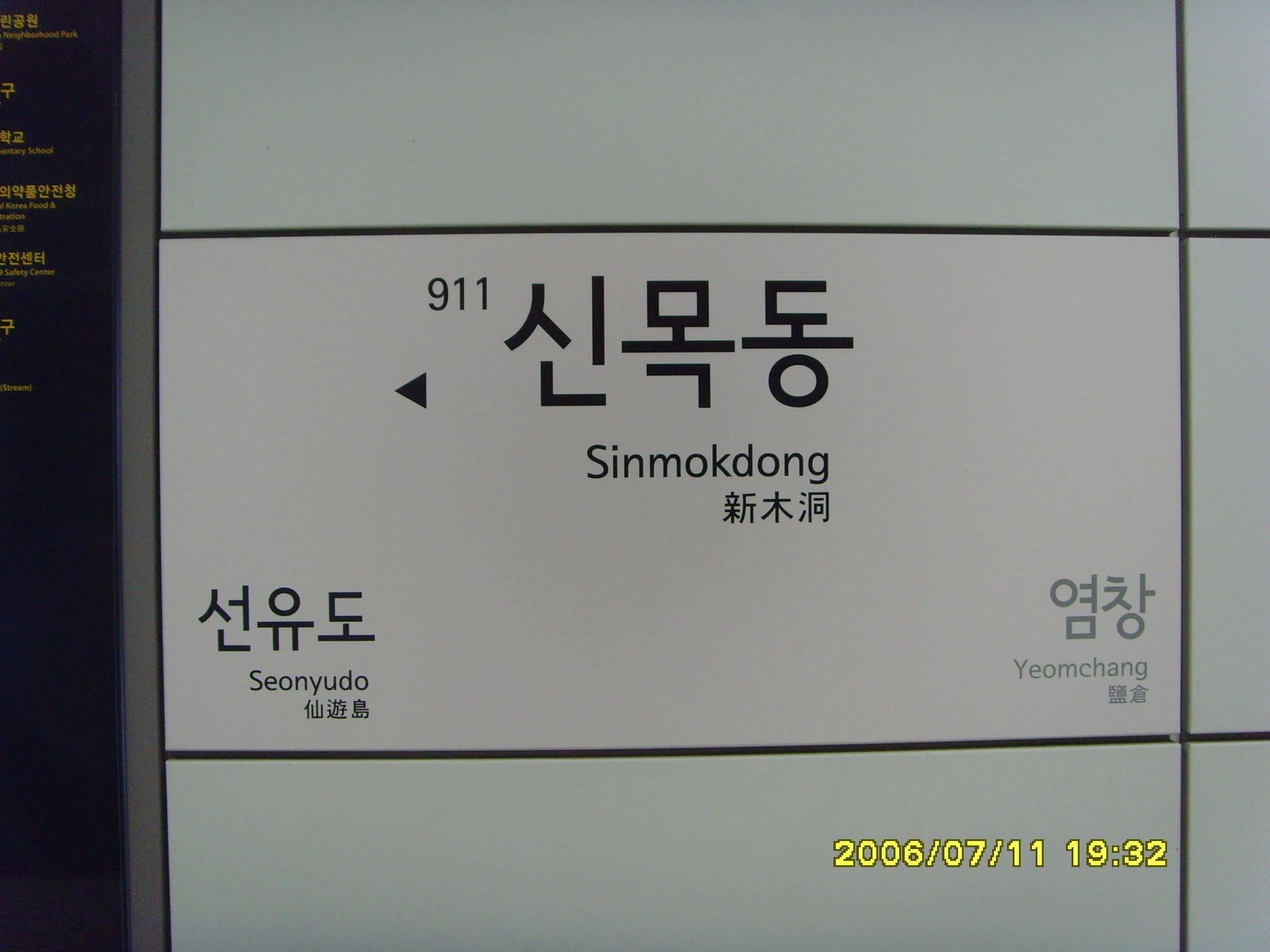 ソウル地下鉄9号線新木洞駅 駅名標